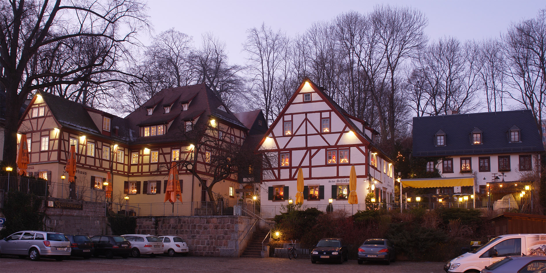 Gasthäuser am Schlossteich, Chemnitz, Deutschland